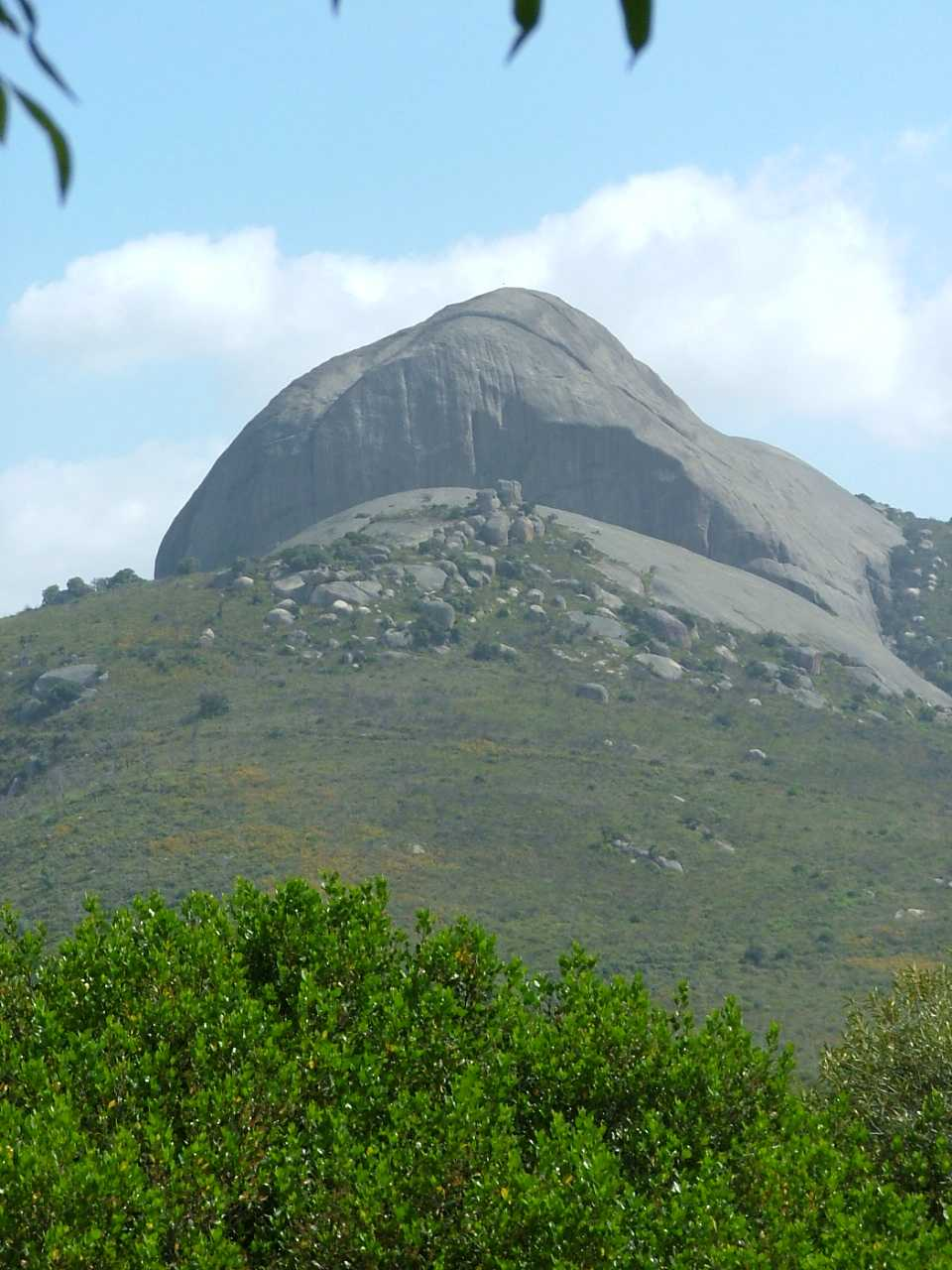 photo par contributeur, pas de copyright